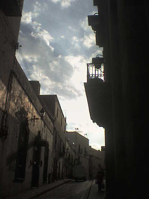 Calle Lascurain de Retana, Guanajuato, Guanajuato